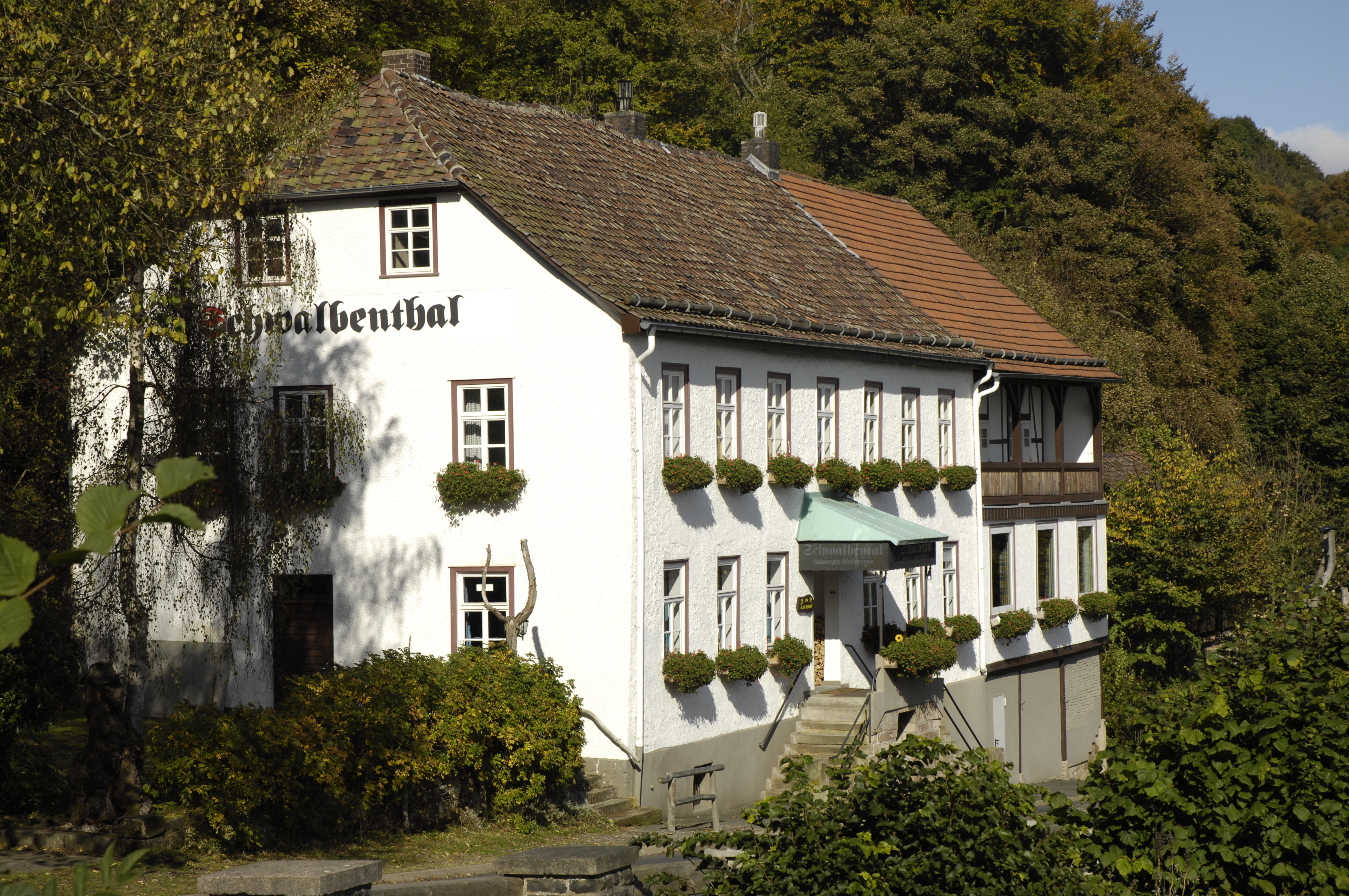 Hoher Meißner, Gasthaus und Aussichtspunkt Schwalbenthal